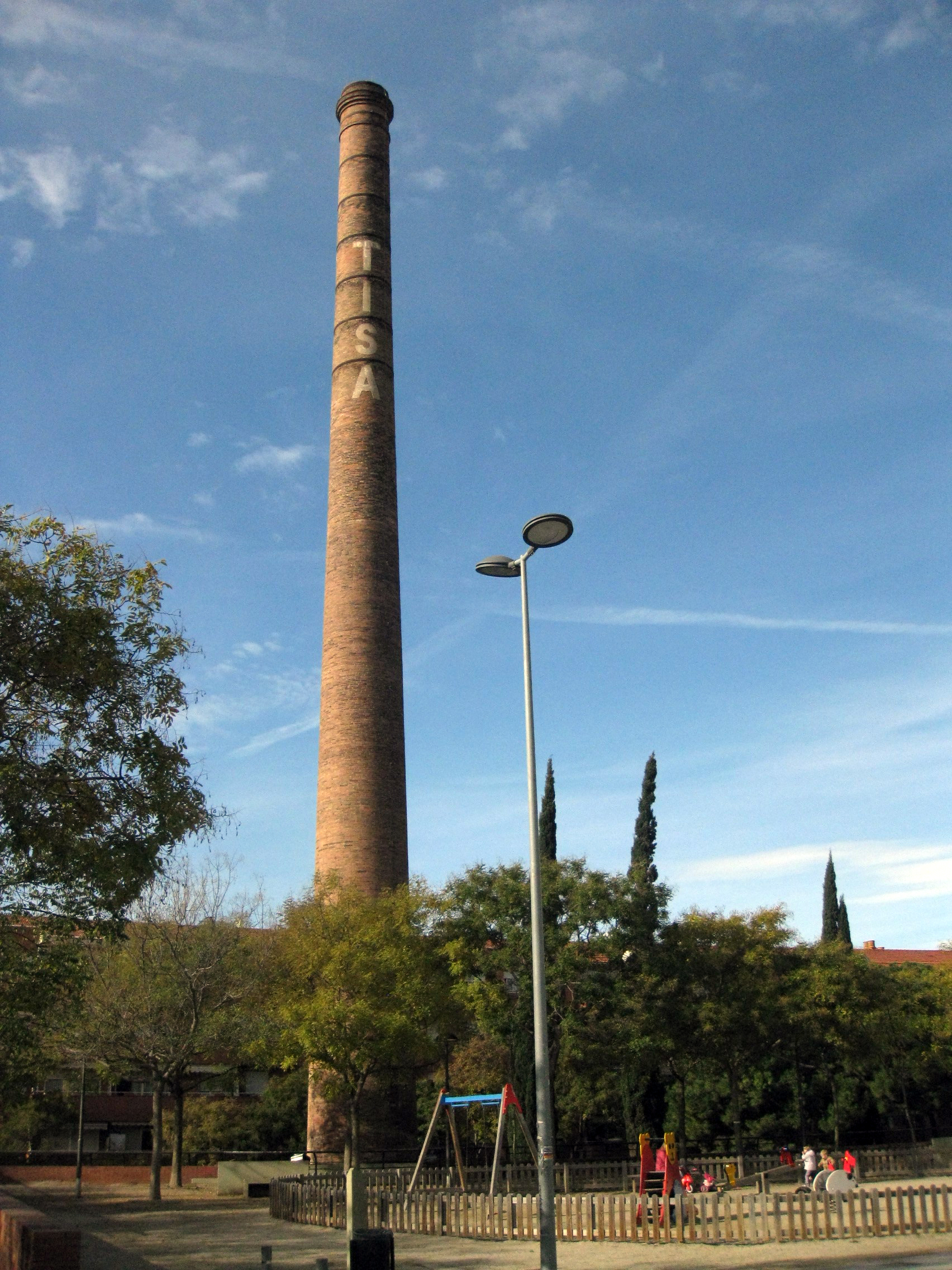 Xemeneia de la Terrassa Industrial (TISA)